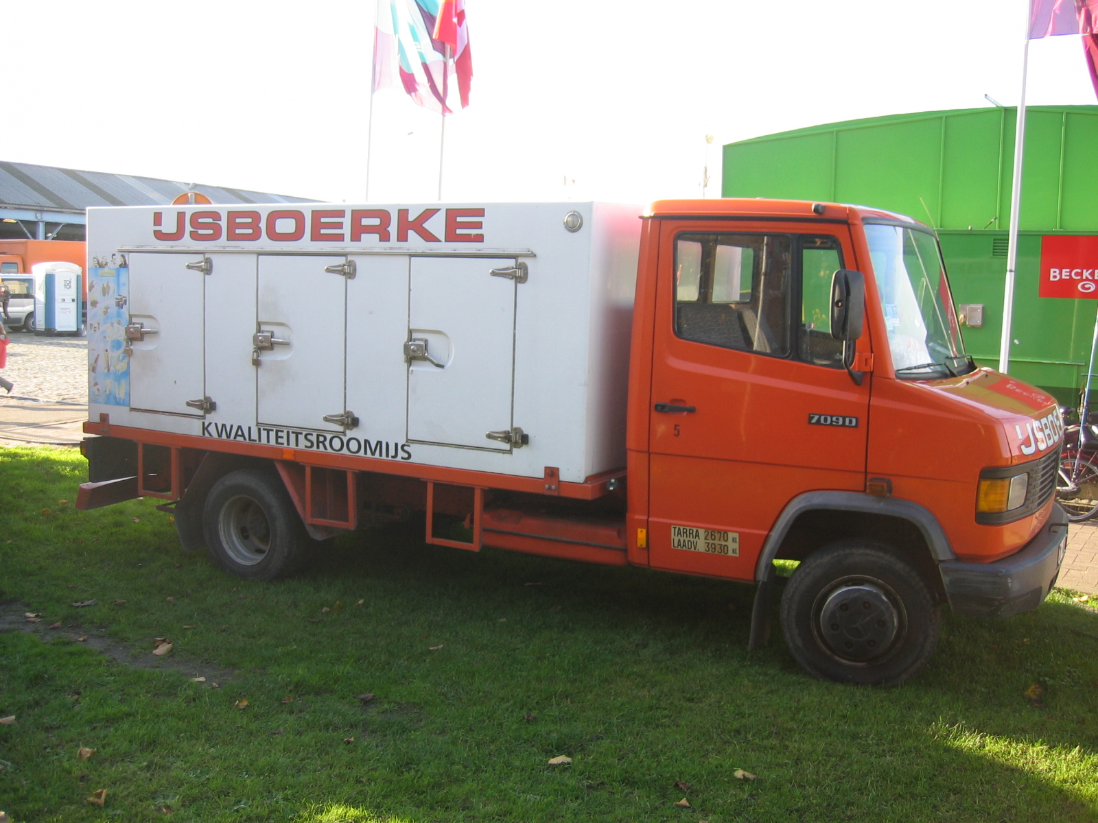 zelf gemaakt (18/11/2006)